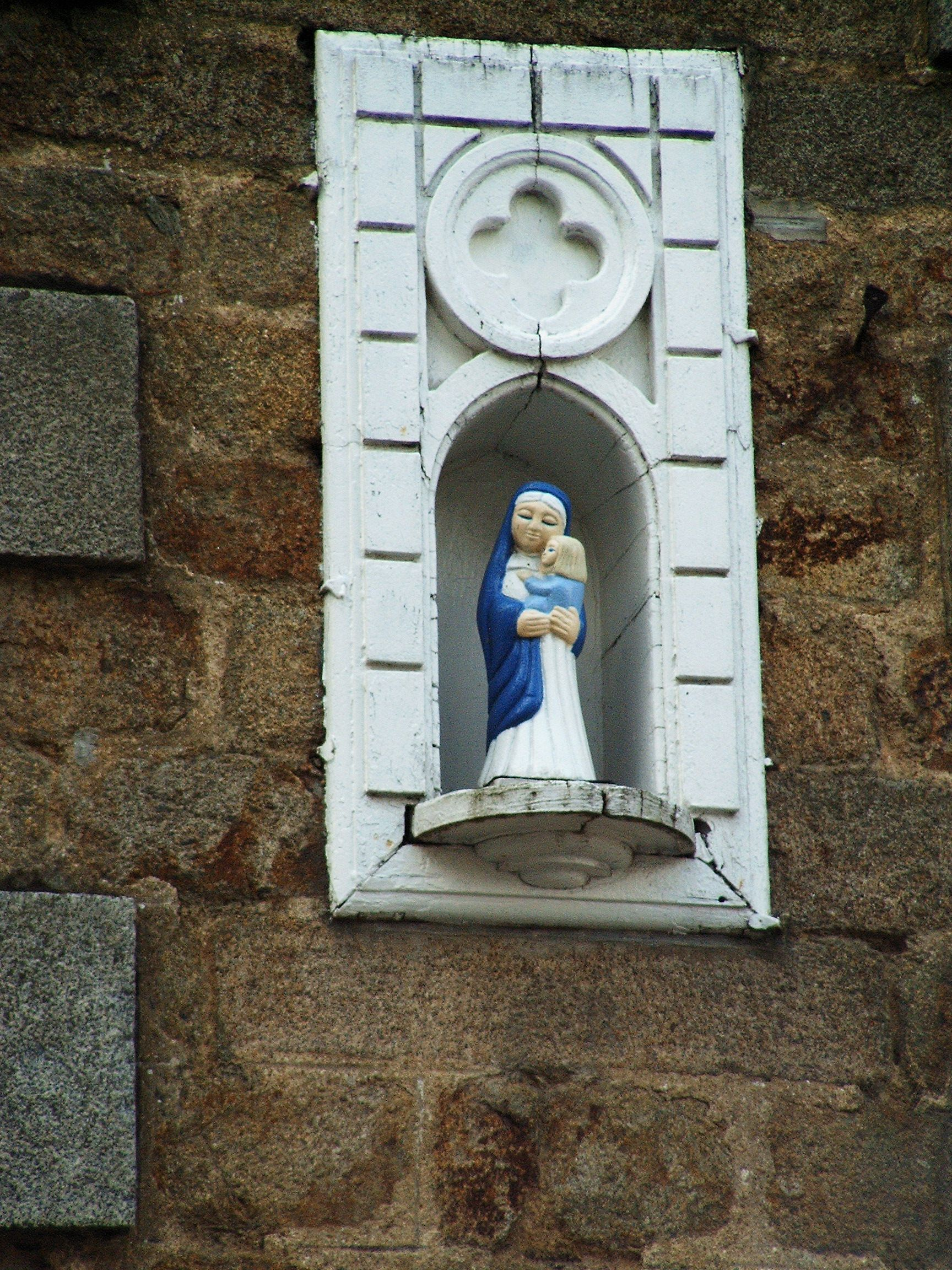 Fougères - Heiligenfigur an einem Haus. Niche avec statue de Sainte-Anne et la Vierge, 29 Rue de la Pinterie à Fougères (35).